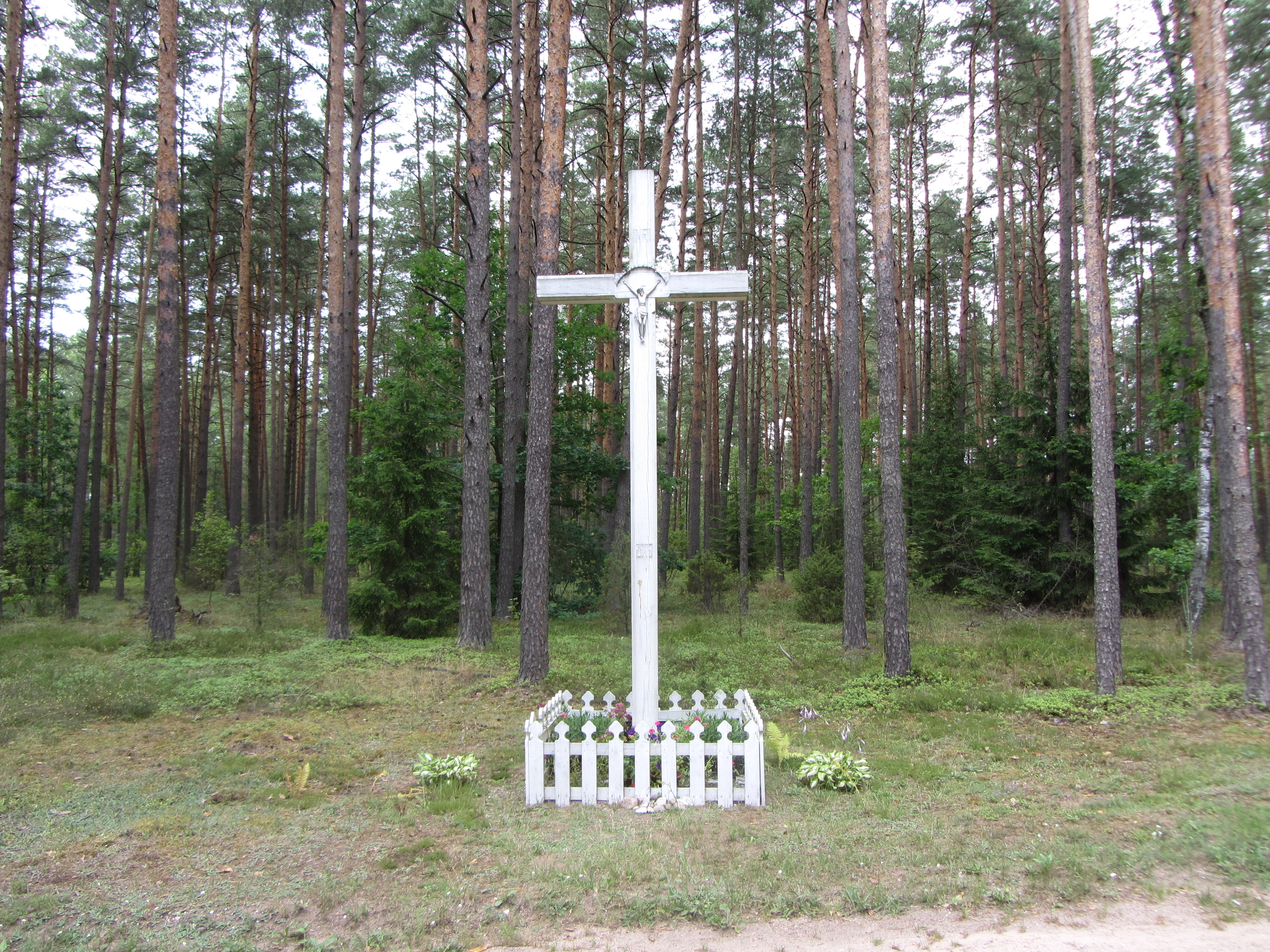 Leipalingio sen., Lithuania